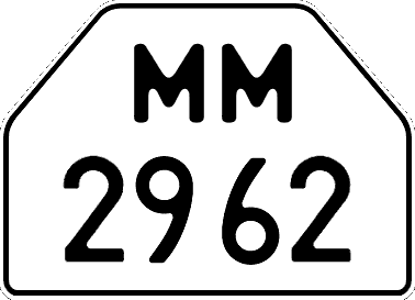 Номерной знак для тракторных прицепов Украины, стандарт 1992 года